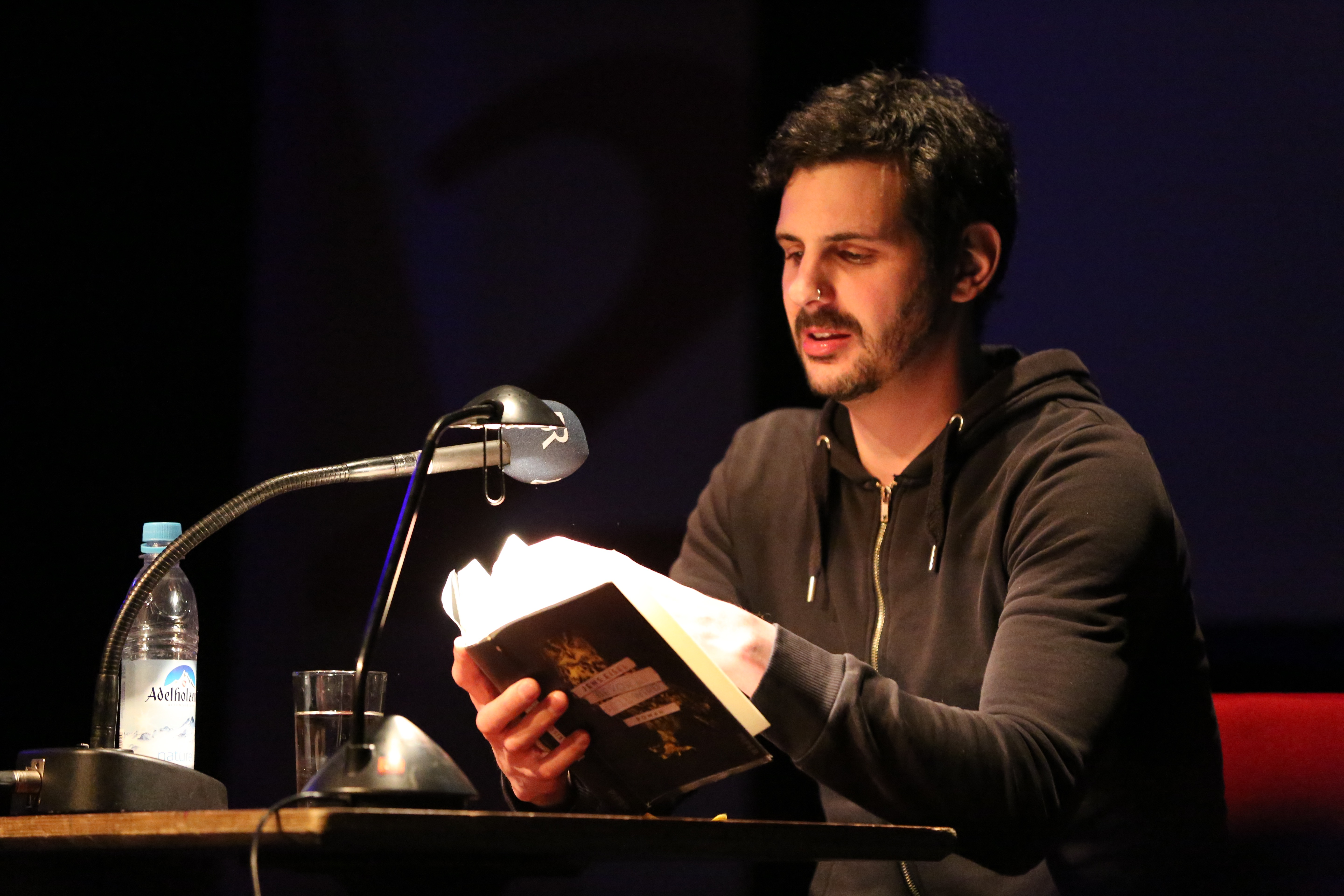 Jens Eisel liest aus seinem Roman "Bevor es hell wird" bei den 17. Wortspielen in München